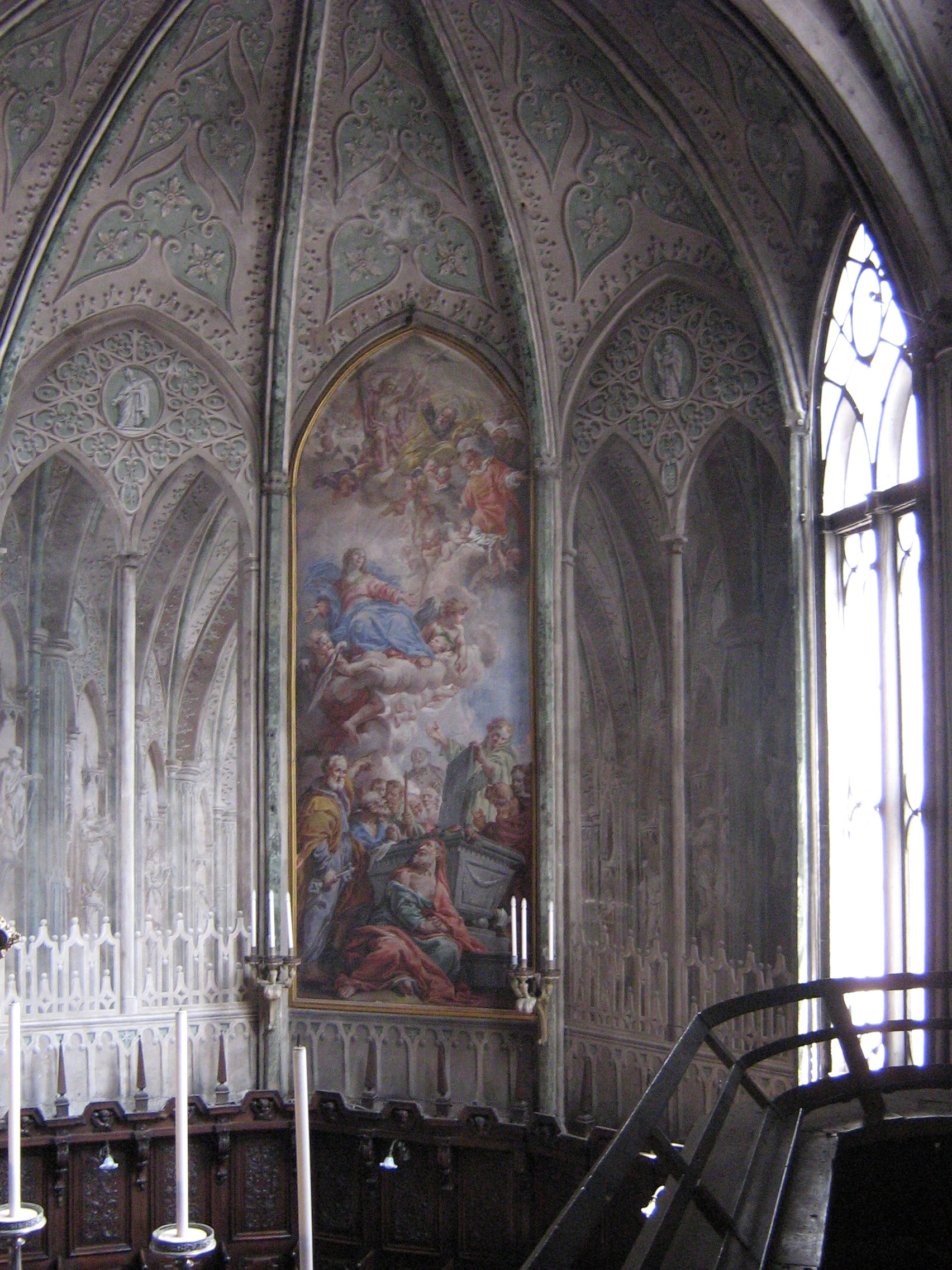 Cattedrale di Biella, interno, vista dalla cantoria.